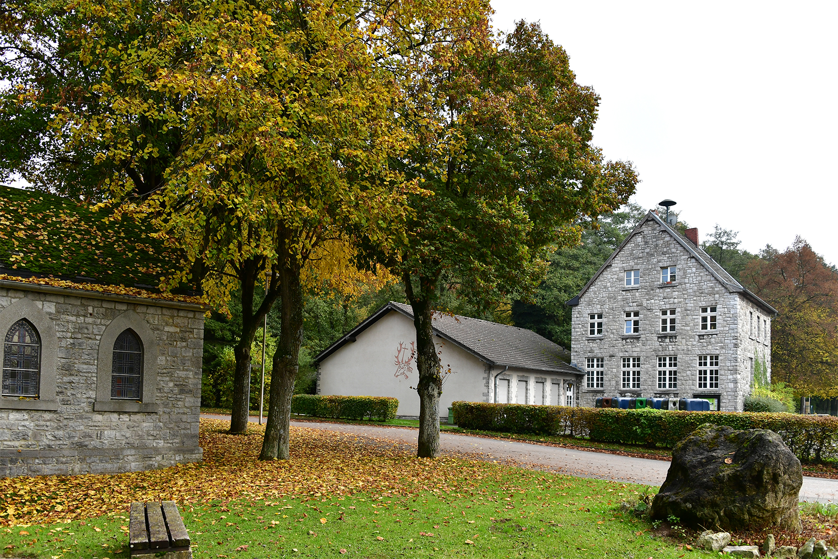 Aachen-Friesenrath Alte Schule 2016